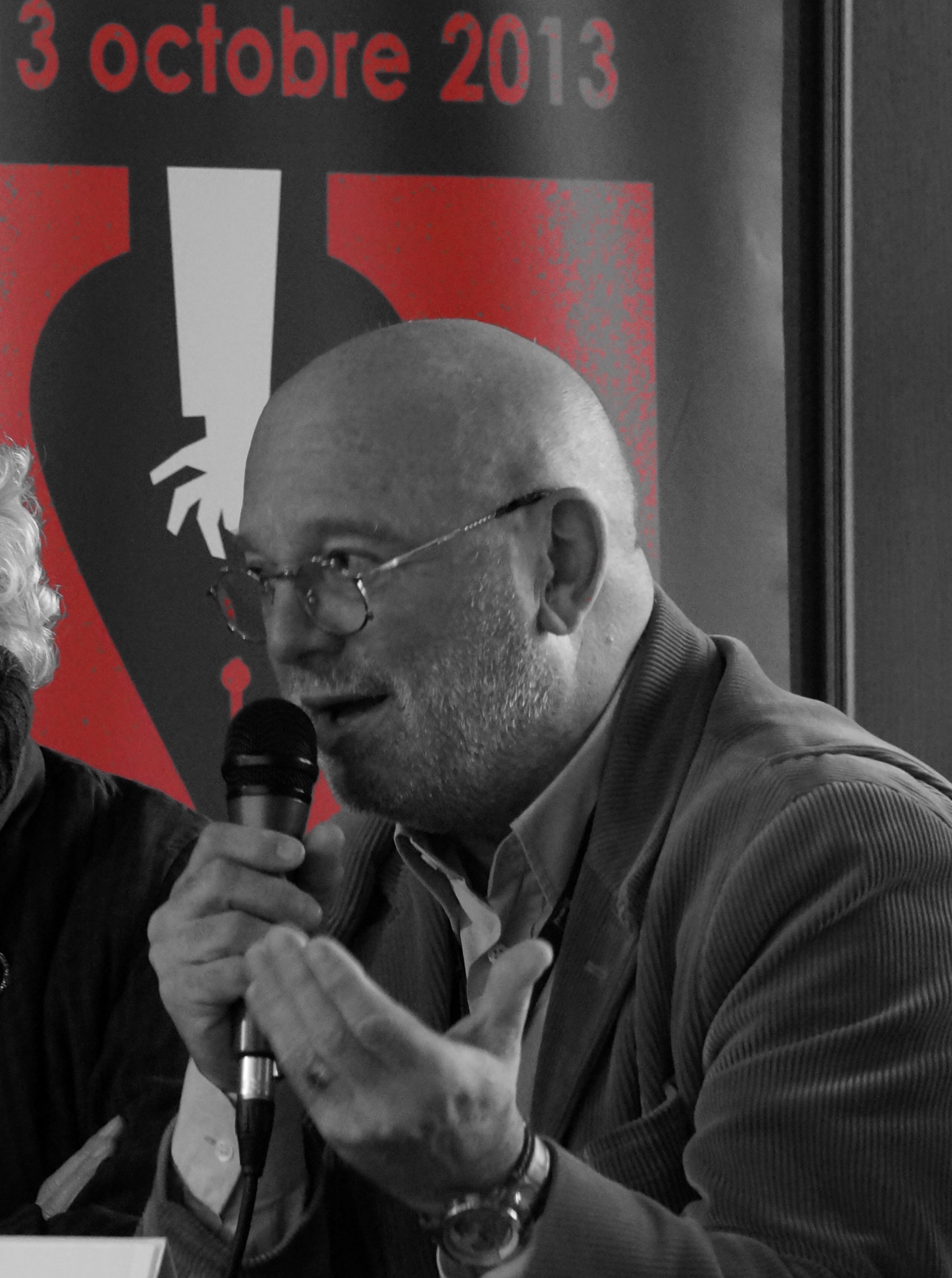 Lors du 8e festival Interpol'art .